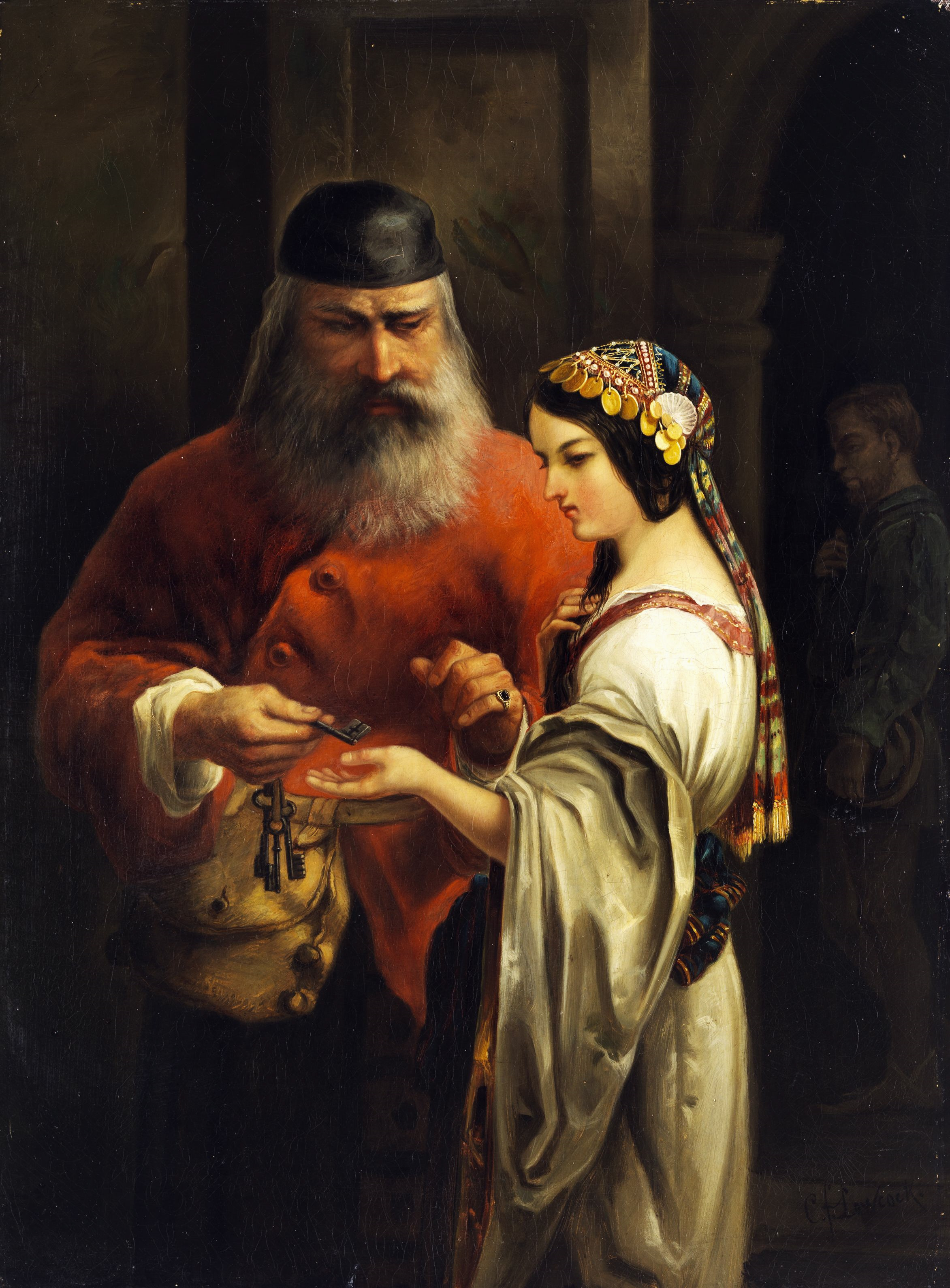 Die Schlüsselübergabe (wohl Shylock und Jessica); Öl auf Leinwand. 62 x 46 cm.